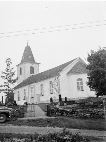 Kyrkan från sydöst. Kategori: (01) ExteriörerKyrkan från sydöst.